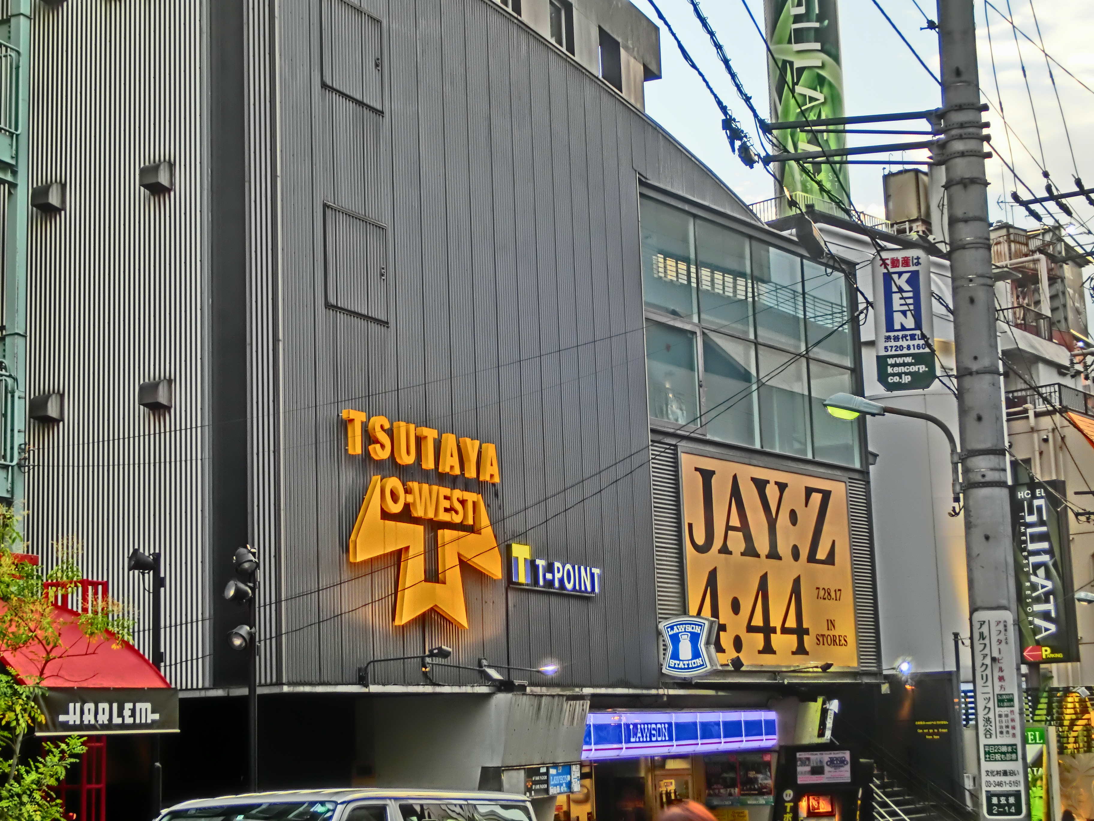 渋谷20170723-1